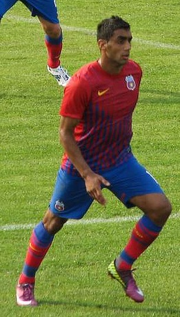 Banel Nicolita in Vointa Sibiu vs Steaua, 1-1, 23 iulie 2011.